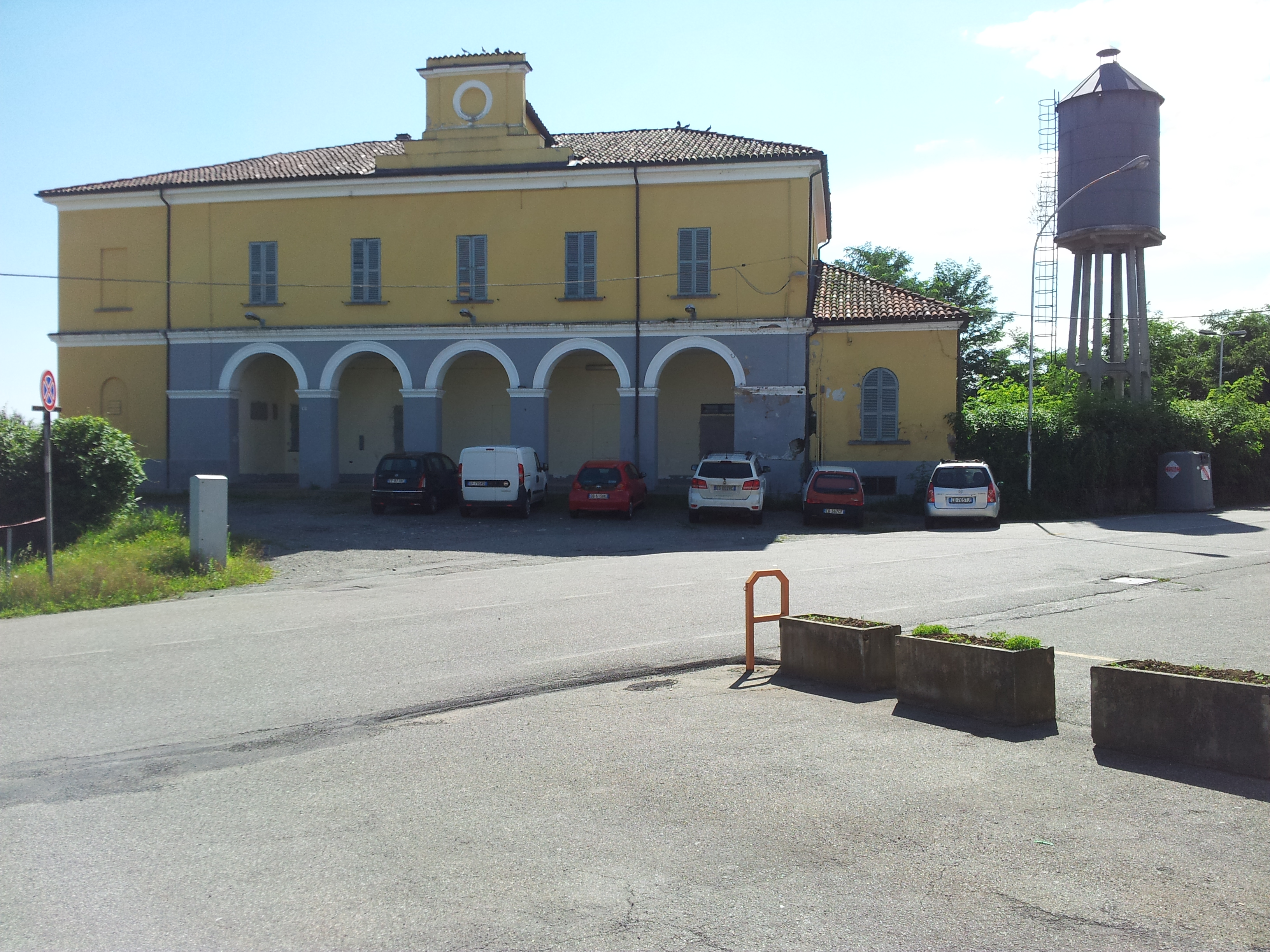 Stazione lato strada. Sulla sinistra si trova l'accesso principale ai binari, mentre sulla destra si trova la vecchia strada (divisa da una recinzione), che attraversava la ferrovia, ed era provvista di passaggio a livello fino al 2002, prima dell'apertura della strada attuale che con il sottopassaggio agevolò il traffico automobilistico.